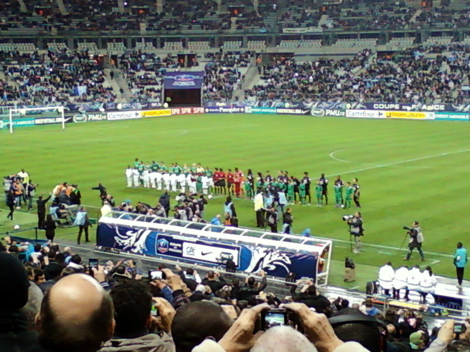 Présentation des équipes lors du match Red Star - Marseille du 7 janvier 2012 au Stade de France